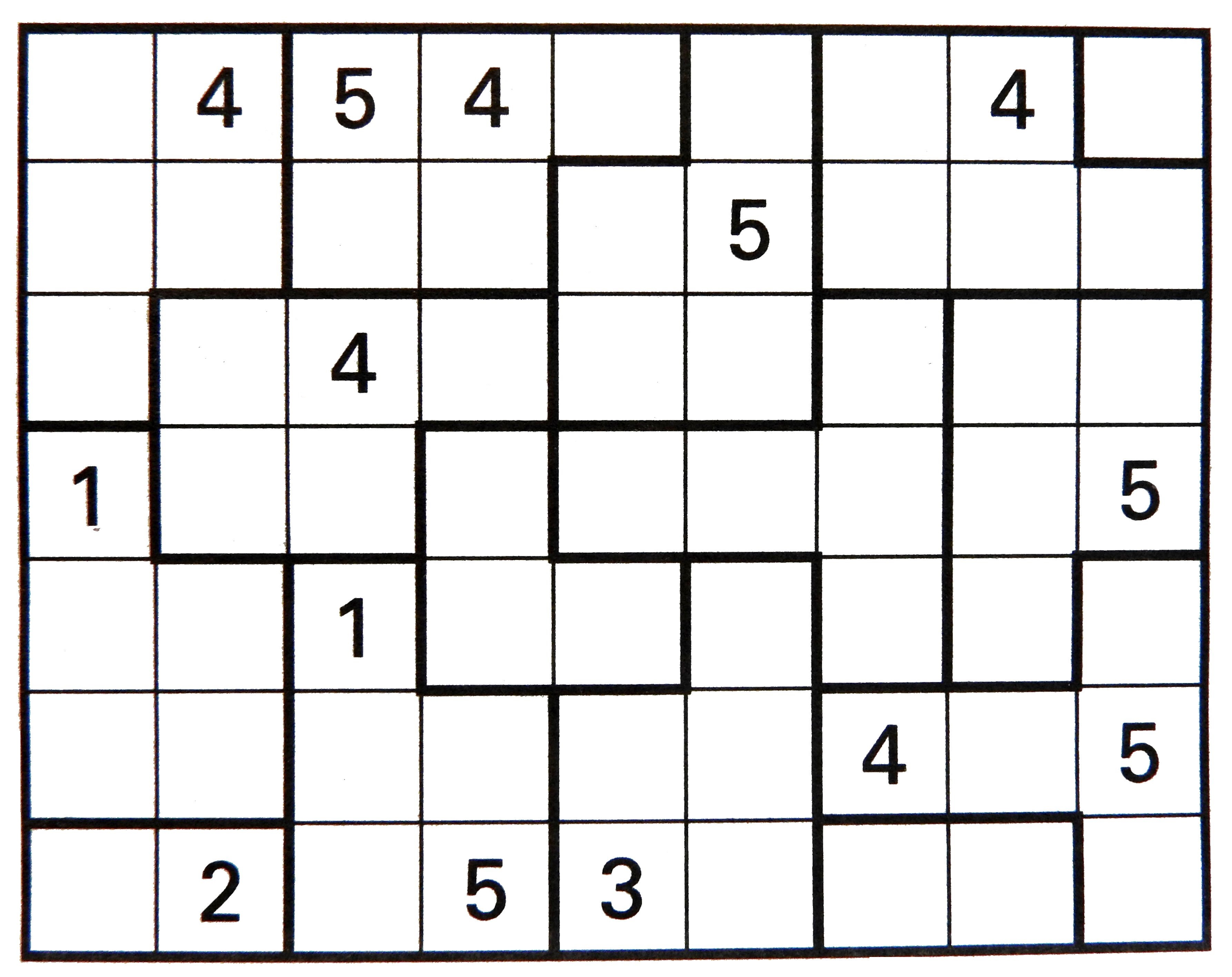 Begindiagram tectonic puzzel